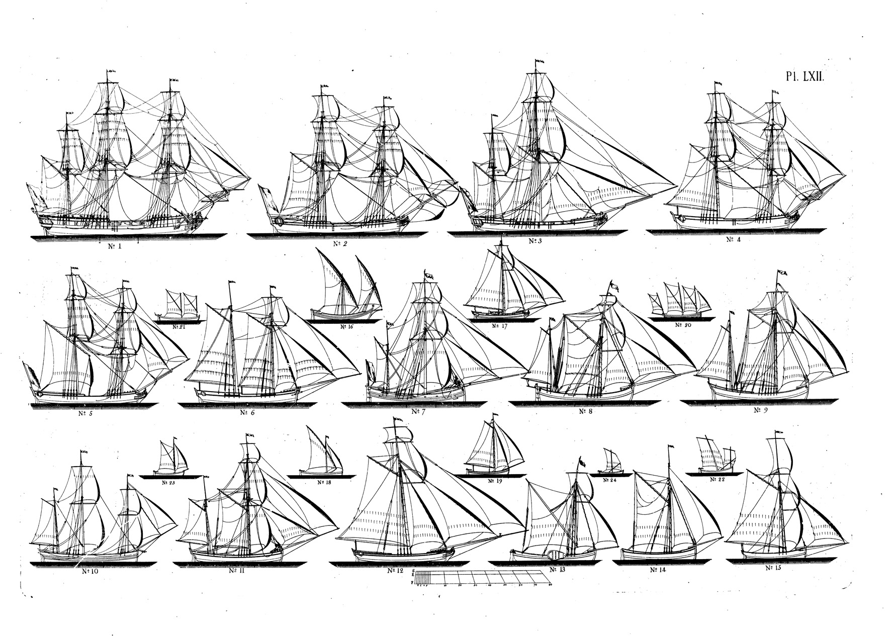 Sammanställning av fartygstyper av Fredrik Henric af Chapman som beskrivs i planschverket "Architectura Navalis Mercatoria", utgiven 1768. Originalbeskrivning: "Visar utseendet av de flere slags Taklingar, som mäst brukas på Skepp och andre fartyg; hvaraf Fartygen gemenligen få Namn. 1. Fregat 2. Snaw 3. Kitz eller Hukare 4. Brigantin eller Brigg 5. Billender 6. Scooner 7. Hållensk fisk Hukare 8. Hartlooper Galleoth 9. Galleass 10. Kreyare 11. Hukare Jagt 12. Jagt 13. Chalk 14. Hoy, Engelsk 15. Engelsk Cutter 16. Tartane 17. Spehl Jagt 18. Fransk Skjeps-båt med latins segel 19. Svensk Skjeps-båtmed Jagtsegel 20. Engelsk Deal Cutter med 3:ne sprisegel 21. Slup med 2:ne Sprisegel 22. En Britonsk Fisk-båt 23. En skjeps-Julle med sprisegel och stagfock 24. En Stockholms Lots-båt Visar allahanda Fartygs åtskillige Taklings-sätt, och är större delen af dessa Taklingar sådane, som Caracterisera fartygen, och finnas upteknade i den tabell som åtföljer Boken. Distancen emellan de små Verticala Linierne, som på N:o 1 äro teknade med a och b, utmärka Fartygets bredd. Råerne suponeras vara så brassade, at de göra en angel af 60° med Fartygets Medellinia, hvaraf följer, at Råernes värkeliga längder äro dubbelt större än hvad de synas på Ritningarne, och äro alla dessa Takel-Ritningar efter en och samma Skala, hvilken finnes upritad på samma Plåt."